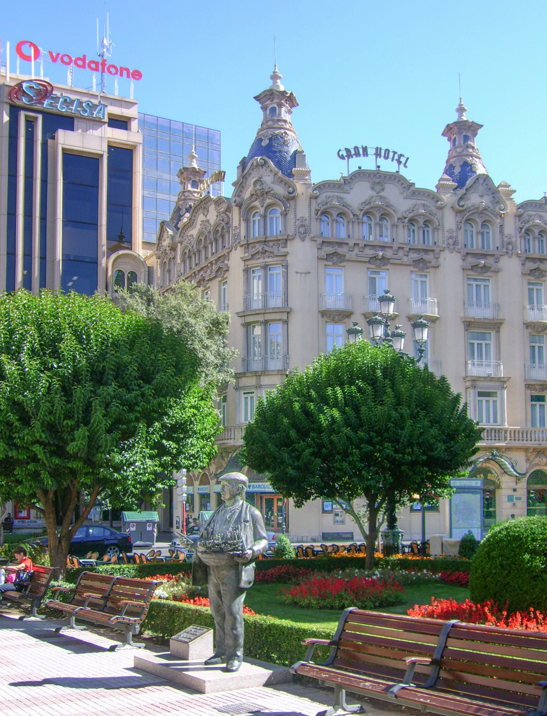 Piazza Principale di Albacete